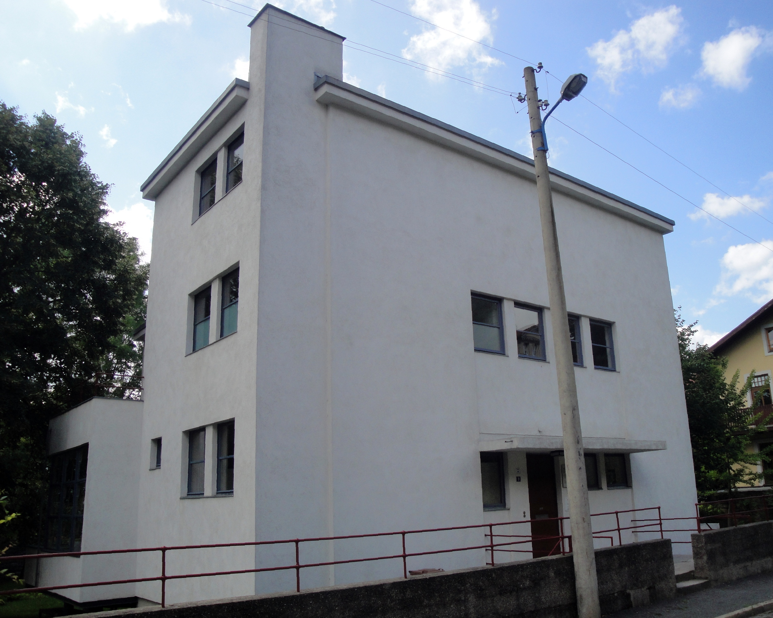 Villa Auerbach, Jena